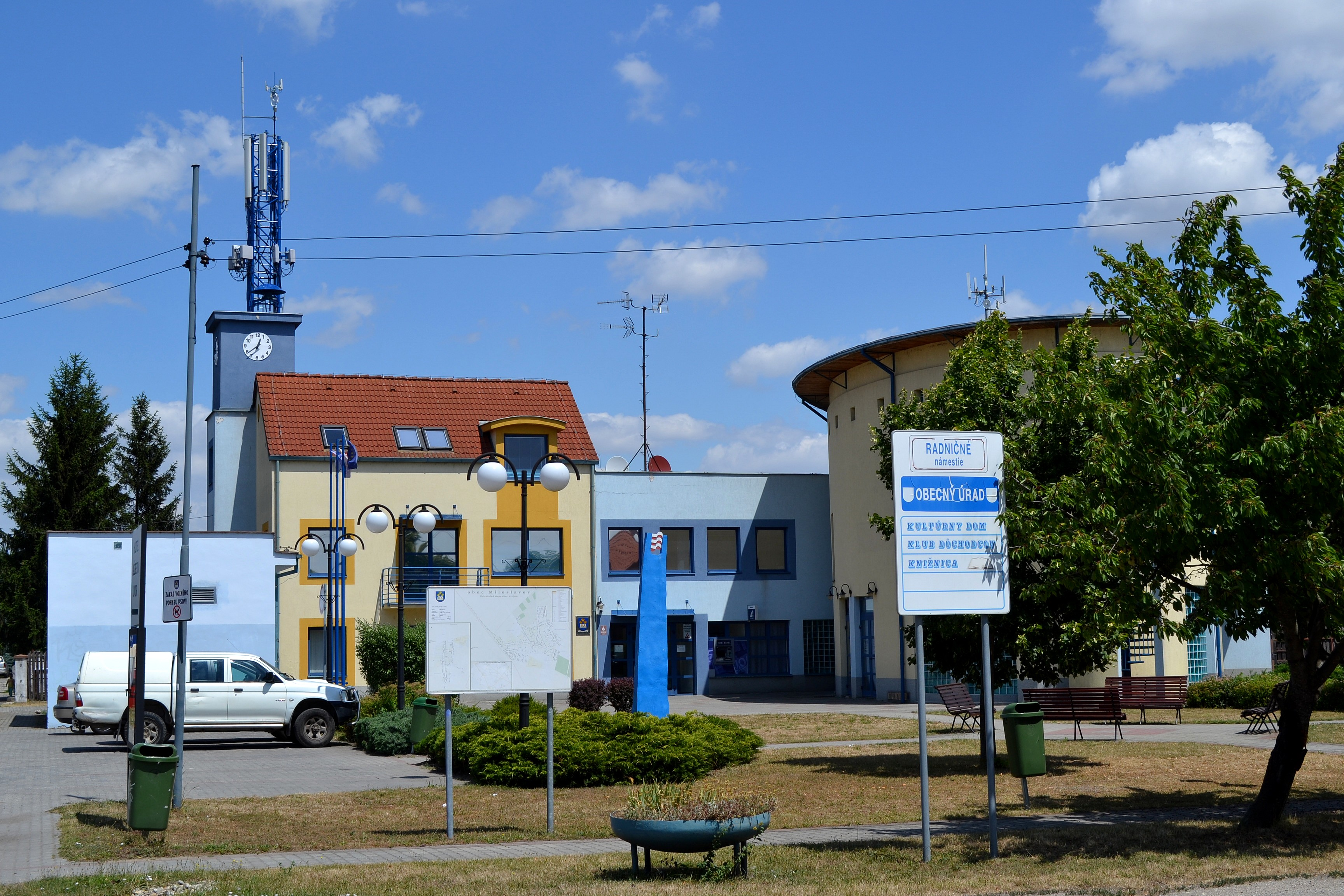 Miloslavov (okr. Senec), centrum obce s budovou obecného úradu